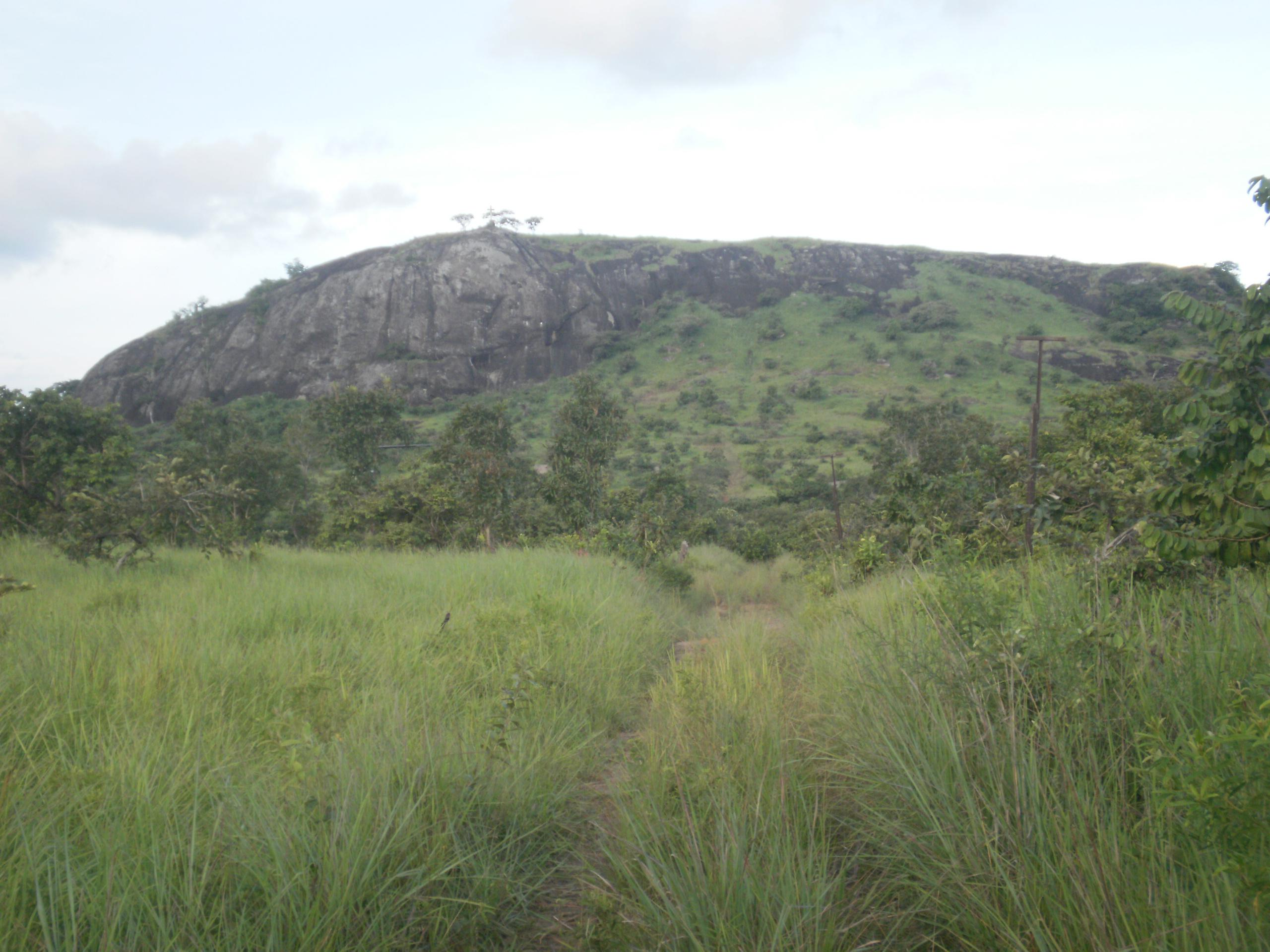 Grotte de Ngog Lituba Face à la route